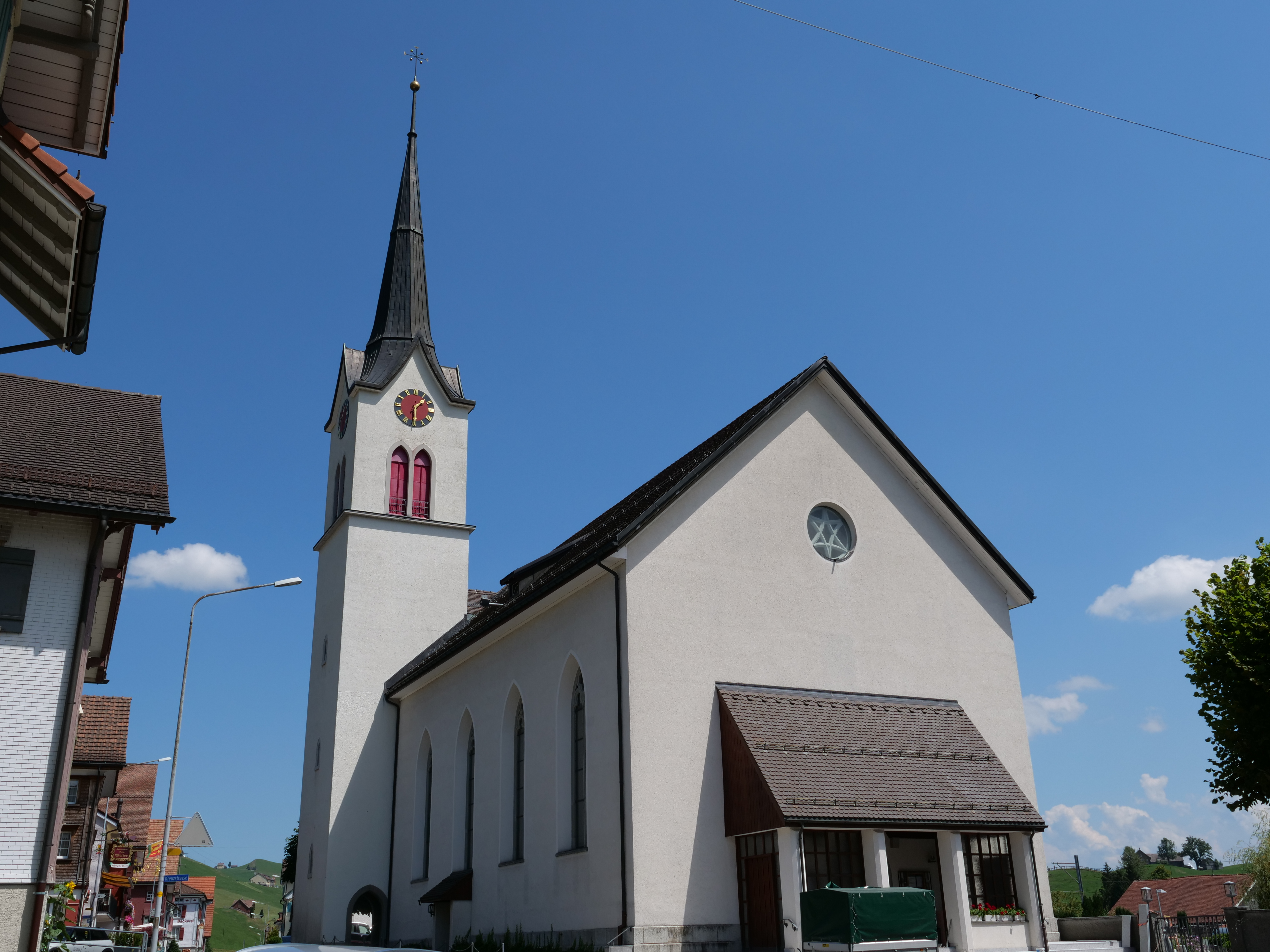 Katholische Kirche St. Verena